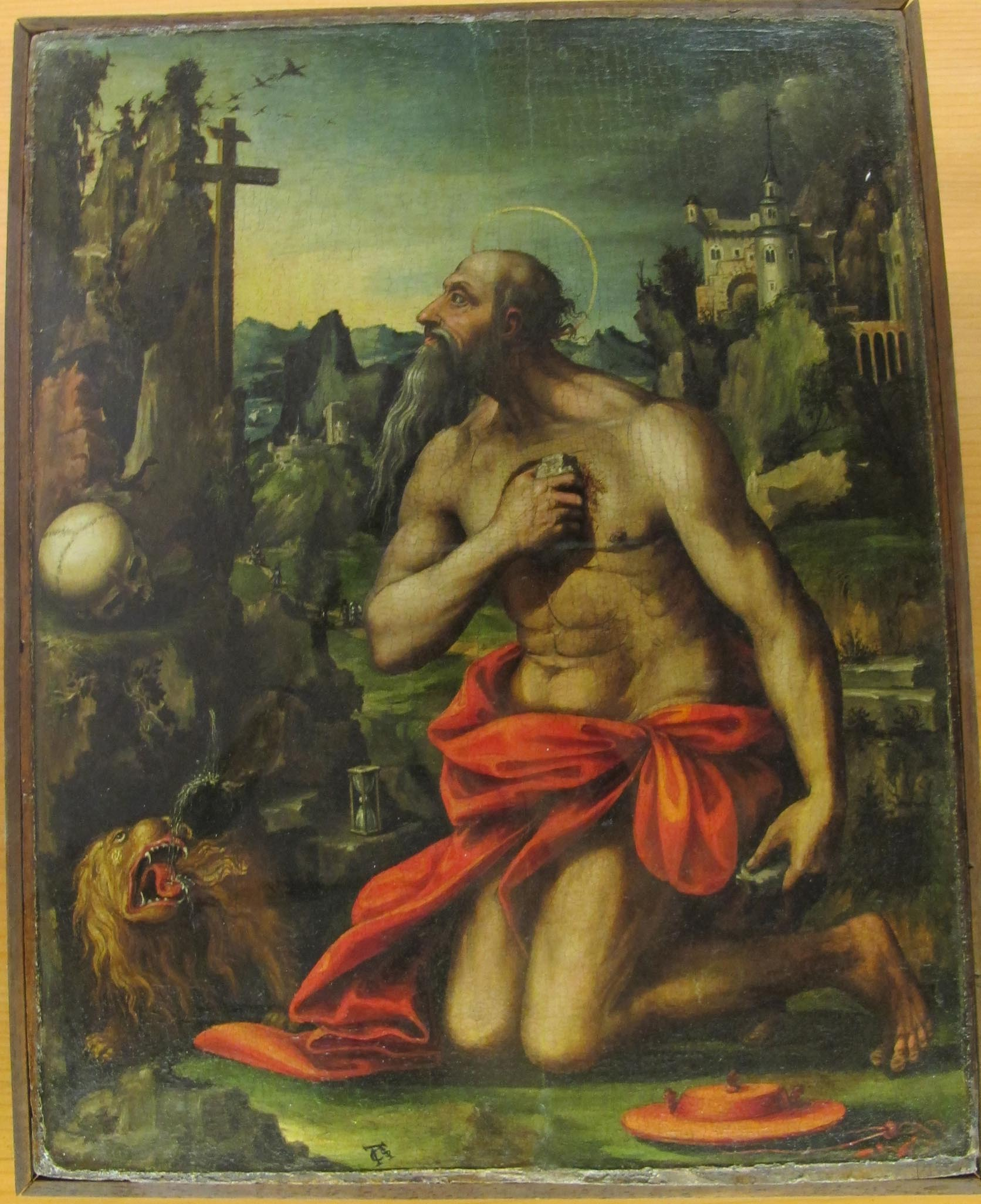 Antonio maria carpenino, san girolamo penitente, XVI sec